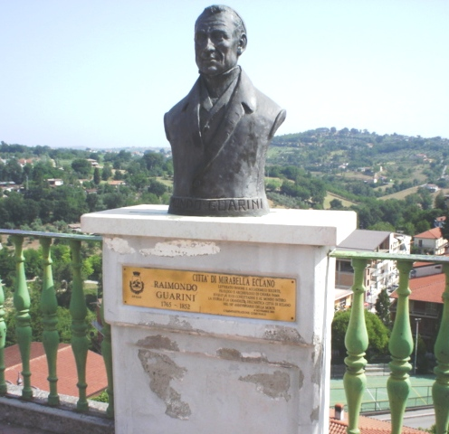 Busto di Raimondo Guarini